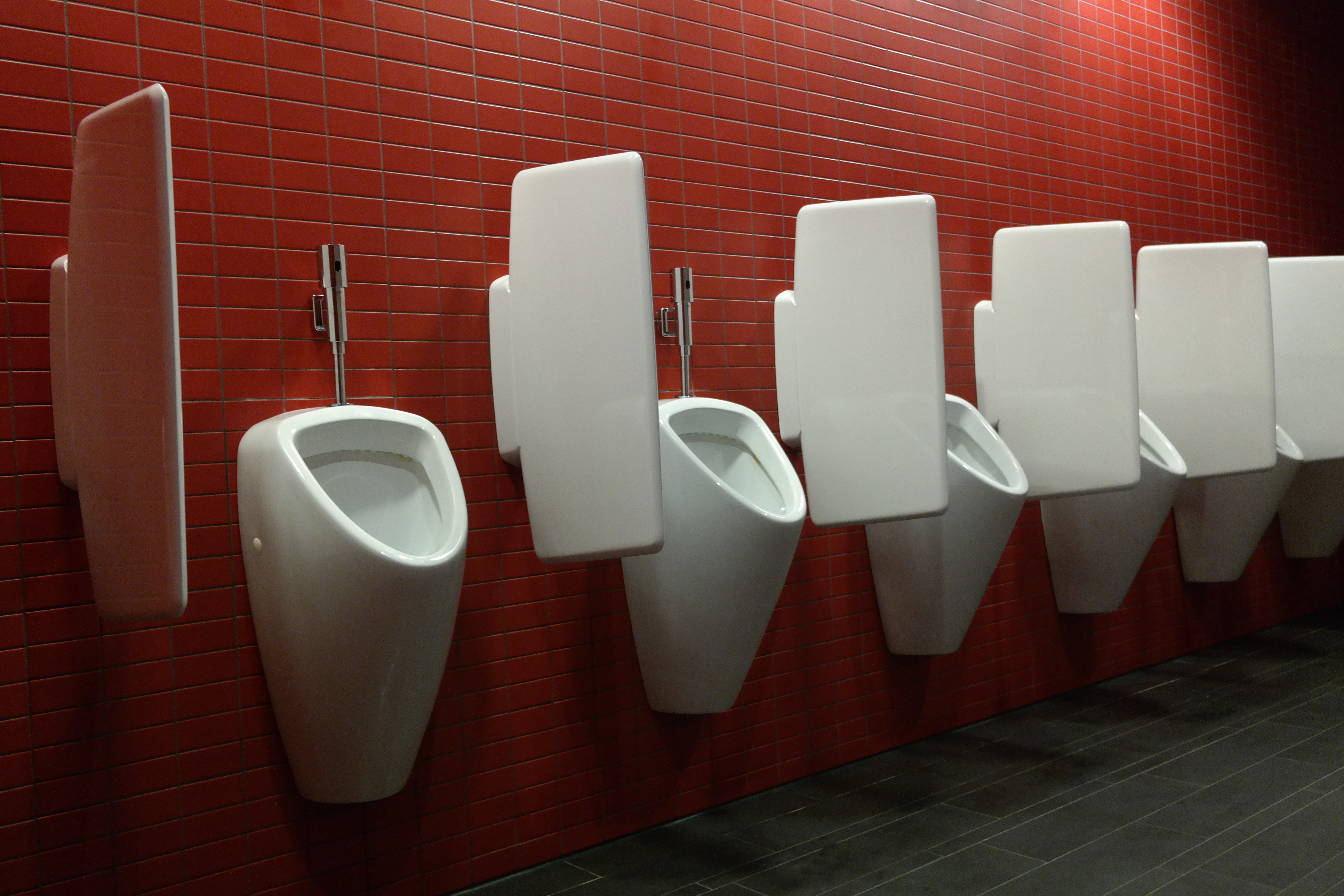 Urinoirs.